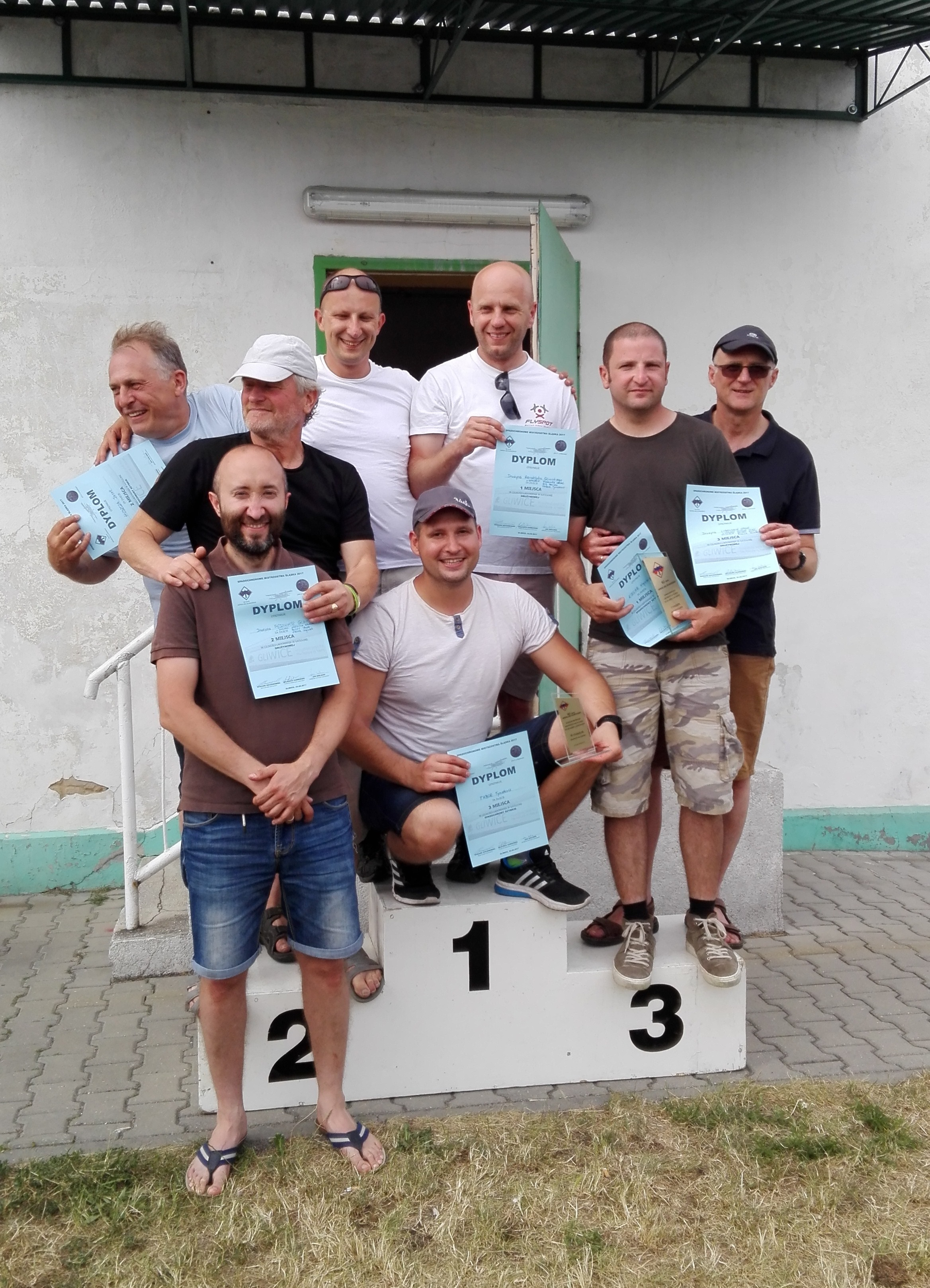 Spadochronowe Mistrzostwa Śląska 2017, zwycięży kategorii drużynowej „spadochrony szybkie“: I miejsce - Sky Masters (Leszek Tomanek, Bartłomiej Ryś, Tymoteusz Tabor), II miejsce - Lubelskie Opole (Jacek Huszcza, Jarek Francik, Andrzej Dziobal), III miejsce - Pędziwiatr Gliwice (Wojciech Kielar, Jacek Bujny, Włodzimierz Karsznia)